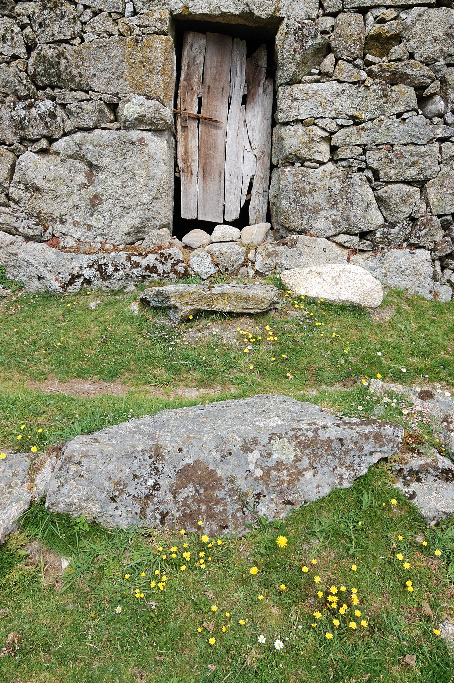 Branda de Gorbelas, Portugal [2011]